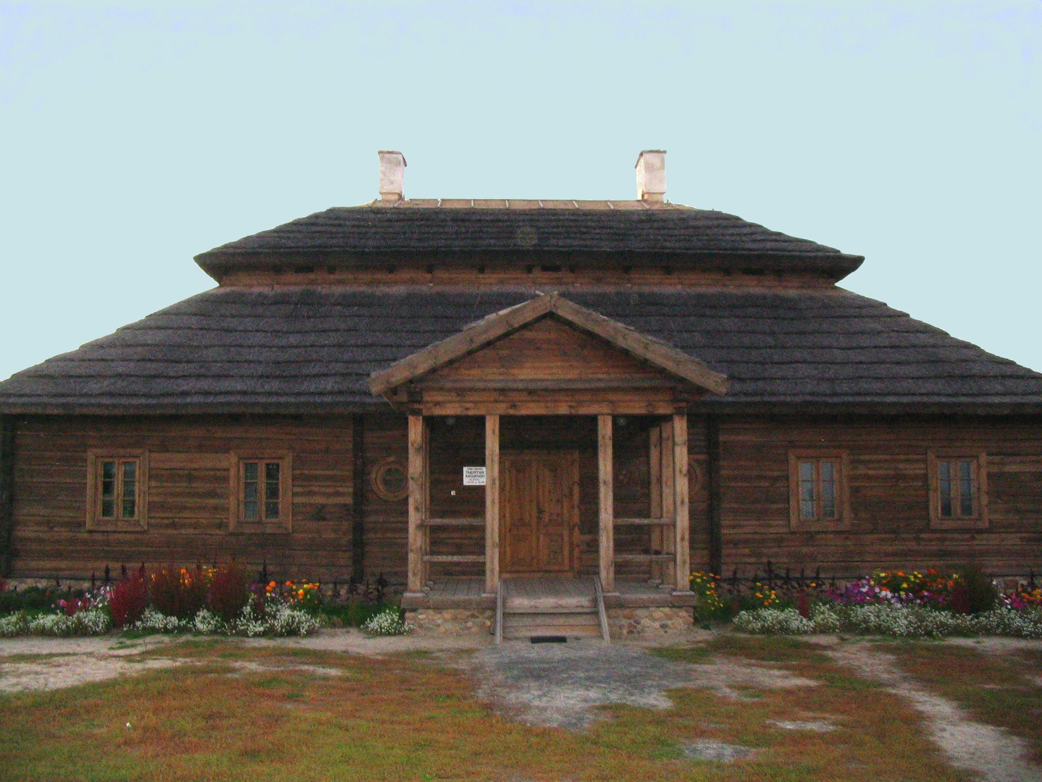 Marachoushchyna